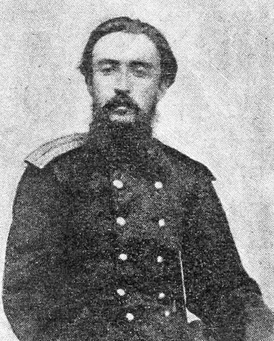 Н. Н. Каразин в 1867—70 гг. Это изображение было использовано для иллюстрирования статьи «Каразин, Николай Николаевич» опубликованной в двенадцатом томе «Военной энциклопедии», который был издан книгоиздательским товариществом И. Д. Сытина в 1913 году в столице Российской империи городе Санкт-Петербурге. Подробное описание к этой картинке можно прочесть в указанной статье.